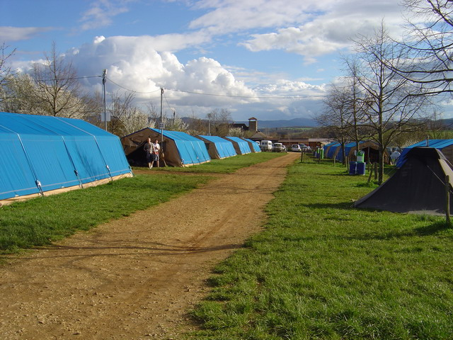 Zeltplatz in Taizé